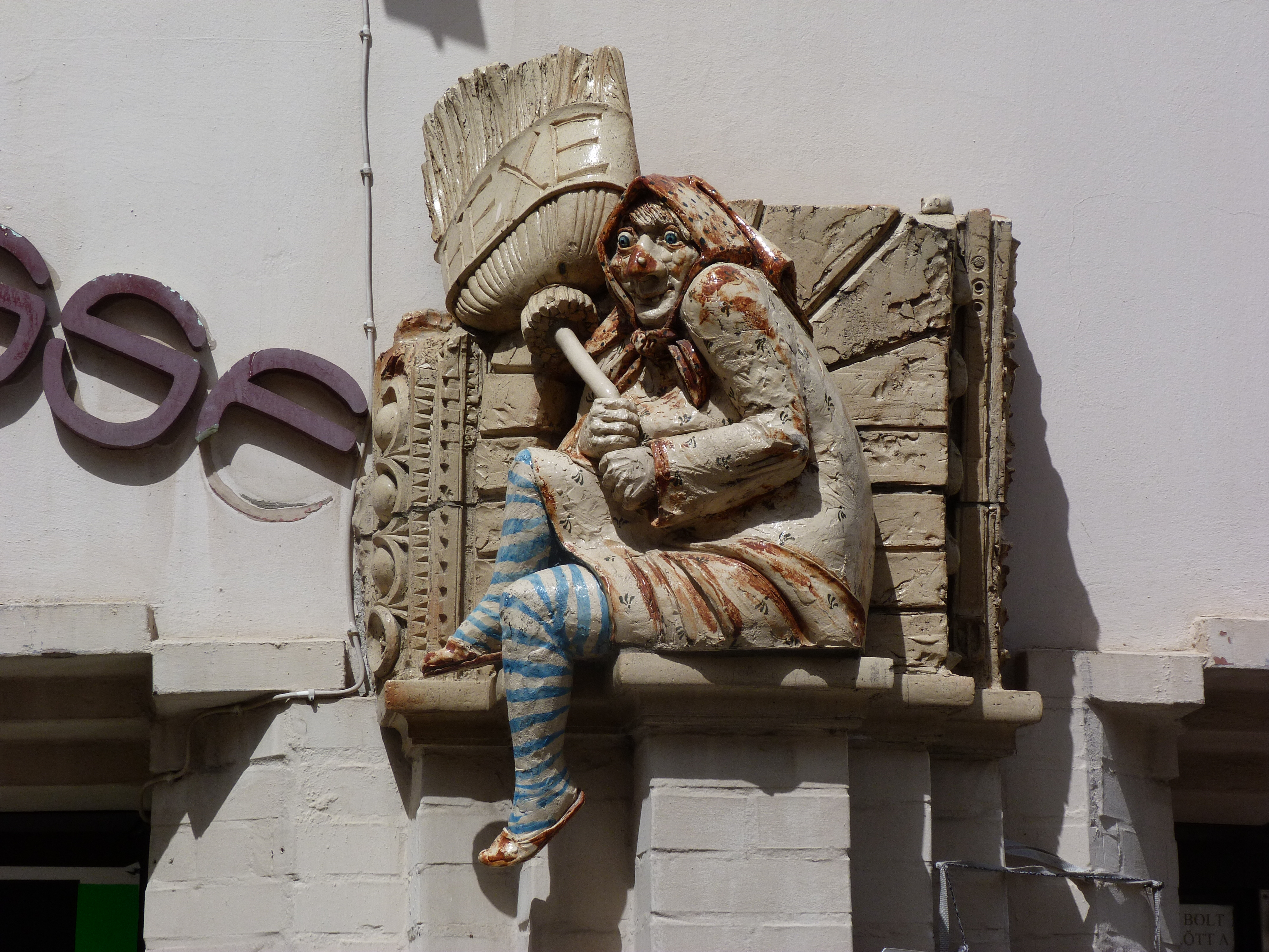 Fürtös György szobra. Pécs, Megye utca 2 szám alatti ház falán. (1984, mázas pirogránit). ©© Derzsi Elekes Andor, Budapest, 2013, You are authorised to use these photos and vids under Creative Commons – even for commercial, for profit purposes. Photos must be attributed to Derzsi Elekes Andor. All of the photos and vids in the Metapolisz DVD line are under Creative Commons and can be used even for commercial – for profit – purposes. Recommended Citation Derzsi Elekes Andor: Metapolisz DVD line